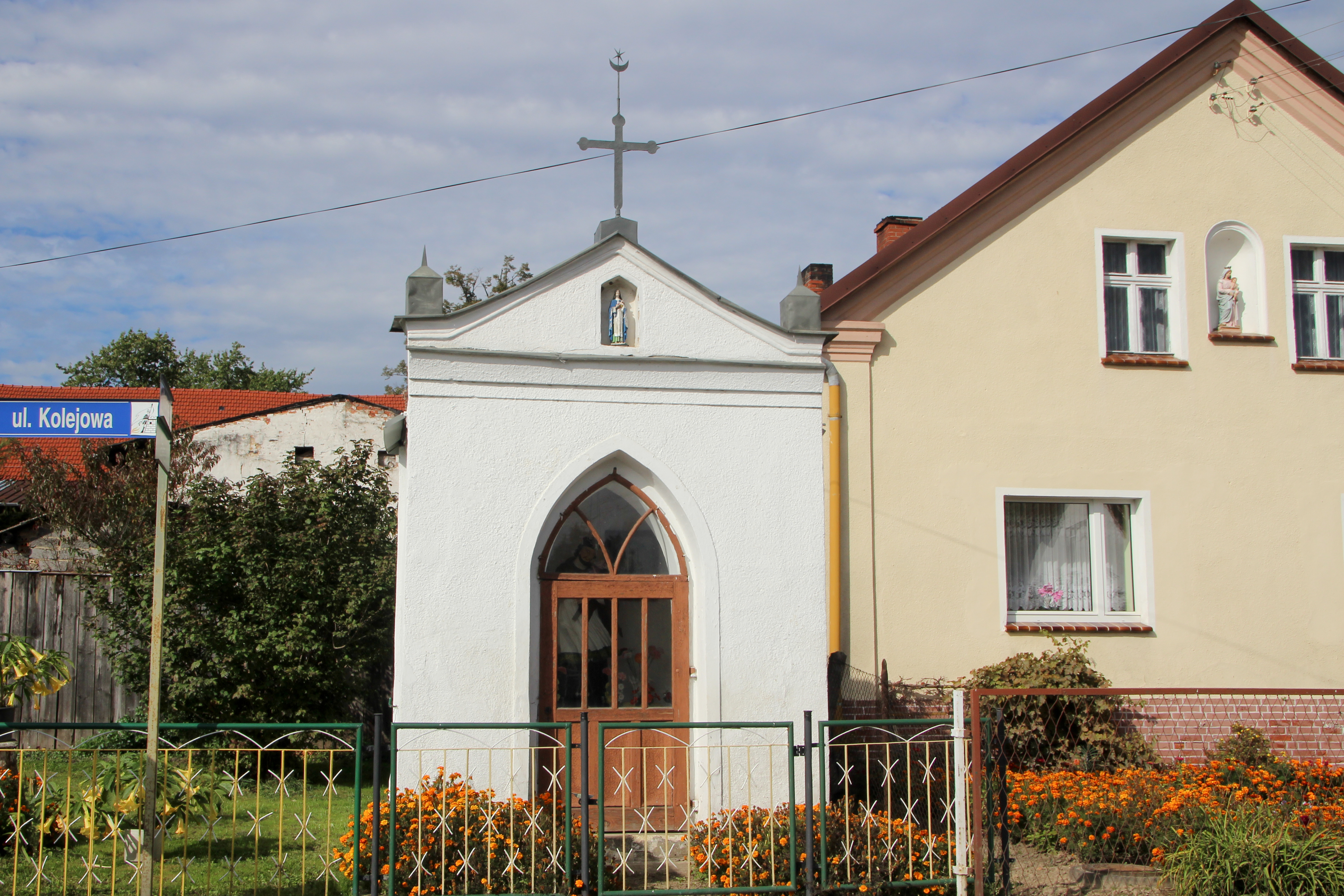 Dzielawy (dodatkowa nazwa w j. niem. Dzielau)- wieś w Polsce położona w województwie opolskim, w powiecie kędzierzyńsko-kozielskim, w gminie Polska Cerekiew.